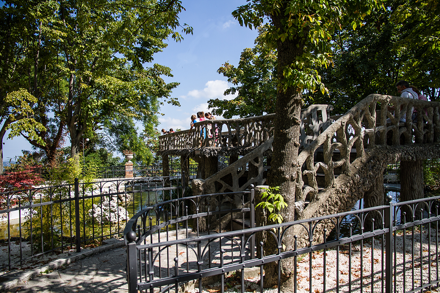 Villa Comunale con fontana e pensilina This is a photo of a monument which is part of cultural heritage of Italy.